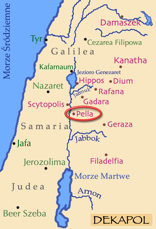 Mapka Dekapolu z zaznaczoną Pellą.